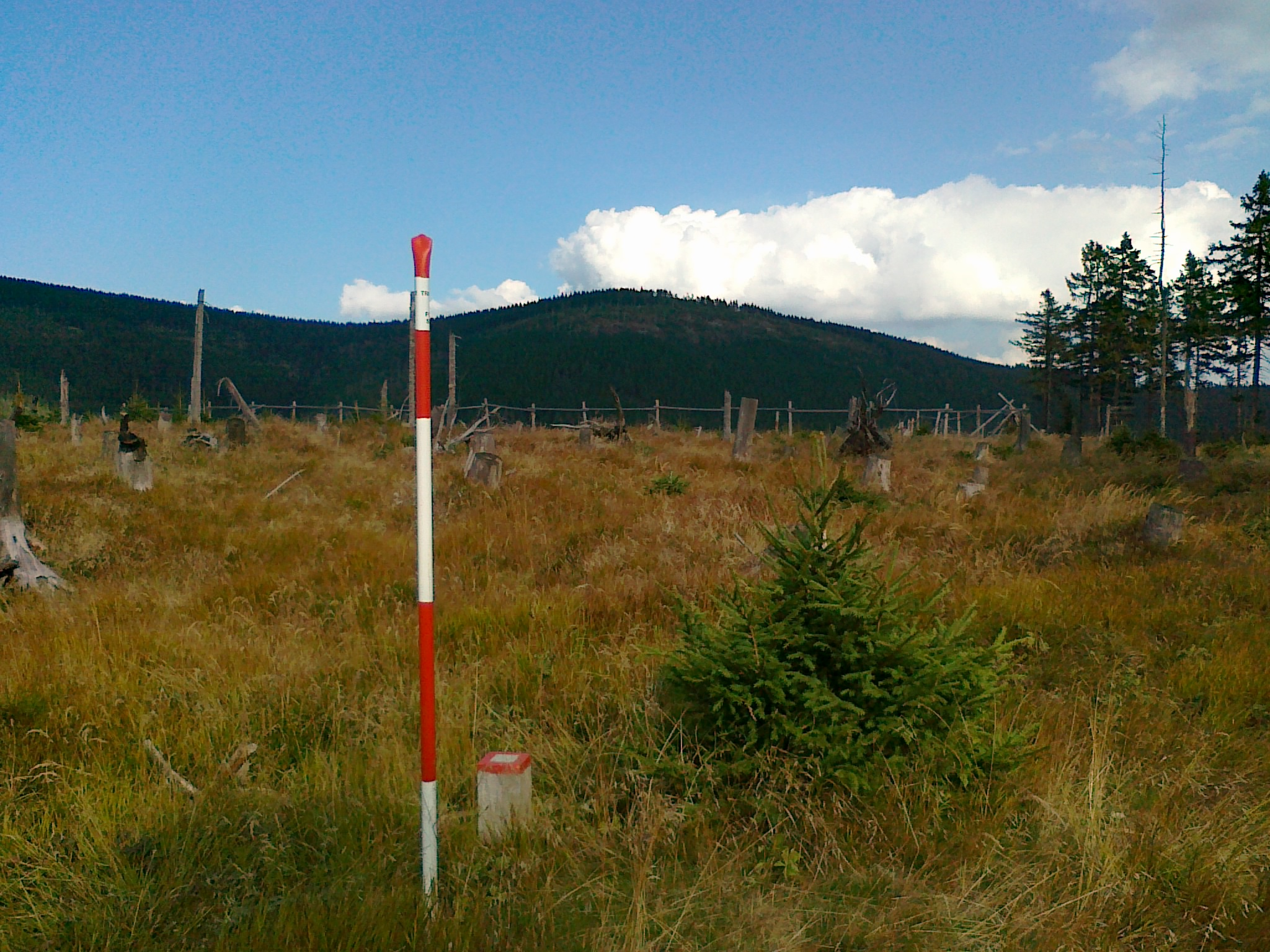 Punkt geodezyjny na szczycie góry Polom - 1127 m n.p.m. (w dali widoczna góra Spálený vrch - 1313 m n.p.m.)